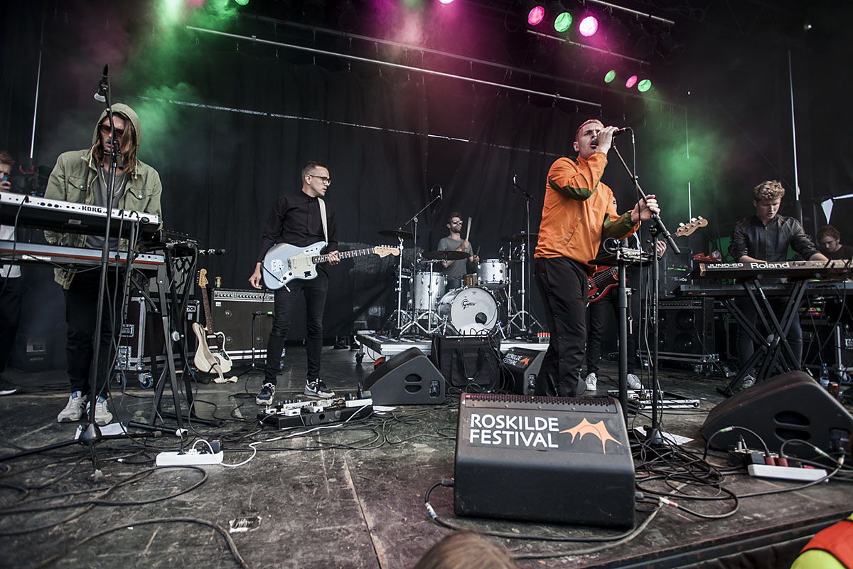 The Minds of 99 på Roskilde Festival 2014